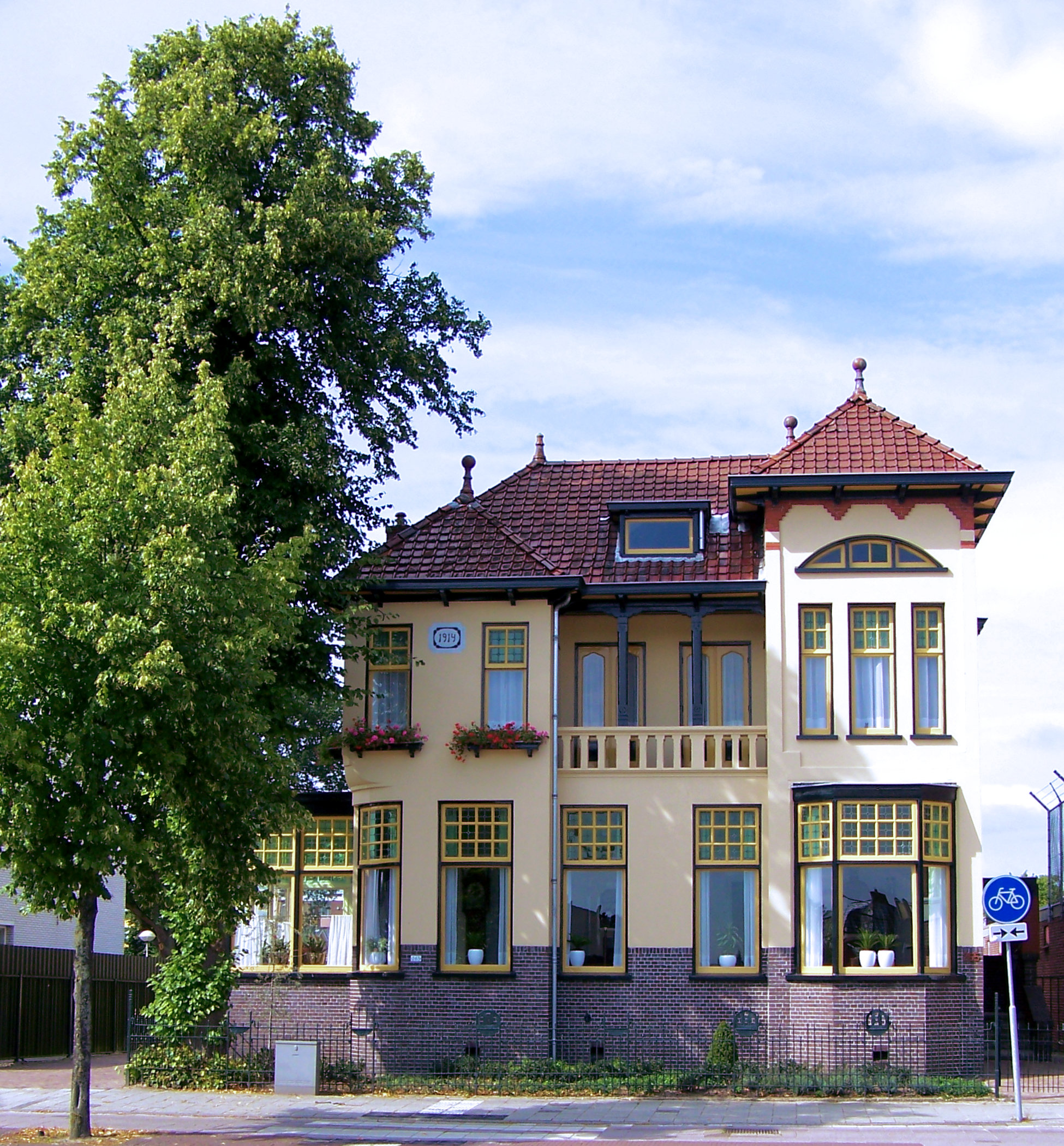 'Villa Zonneschijn' aan de Hoofdstraat 265 in Hoogezand